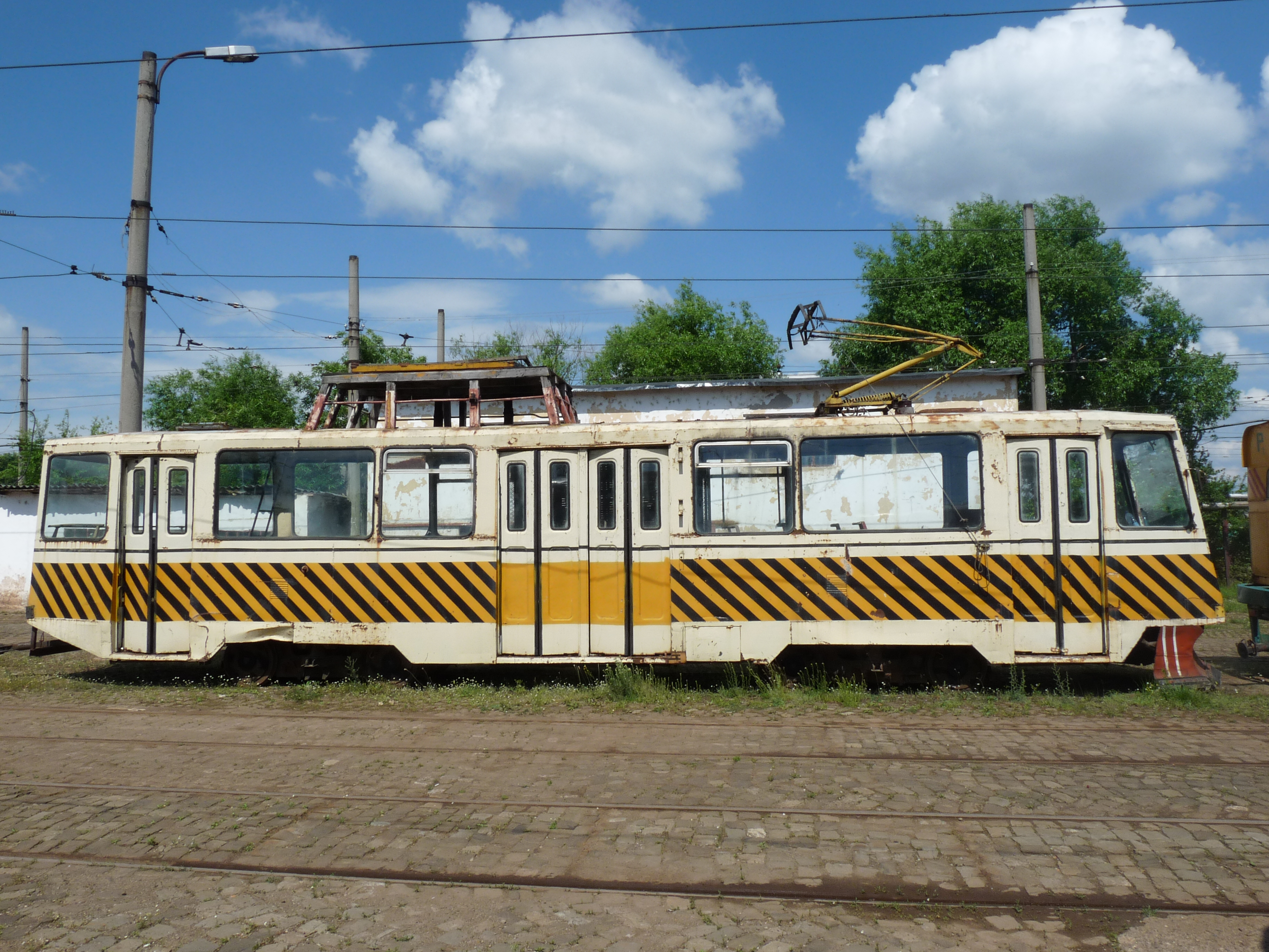 De stelplaats in Brăila